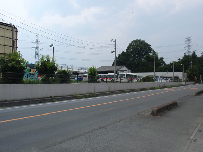 川越観光バス森林公園営業所